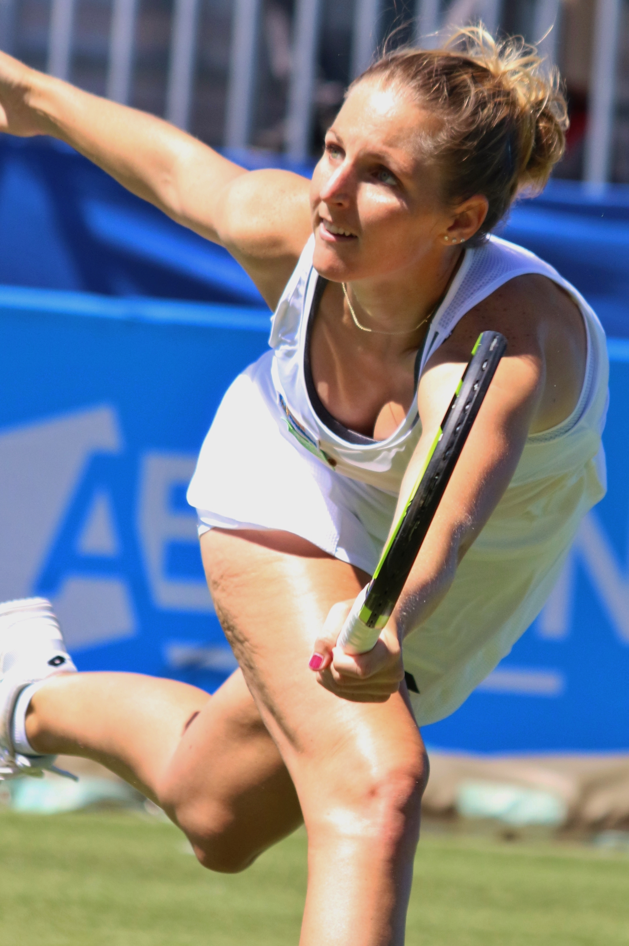 Pliskova Kr. EBN17 (22)